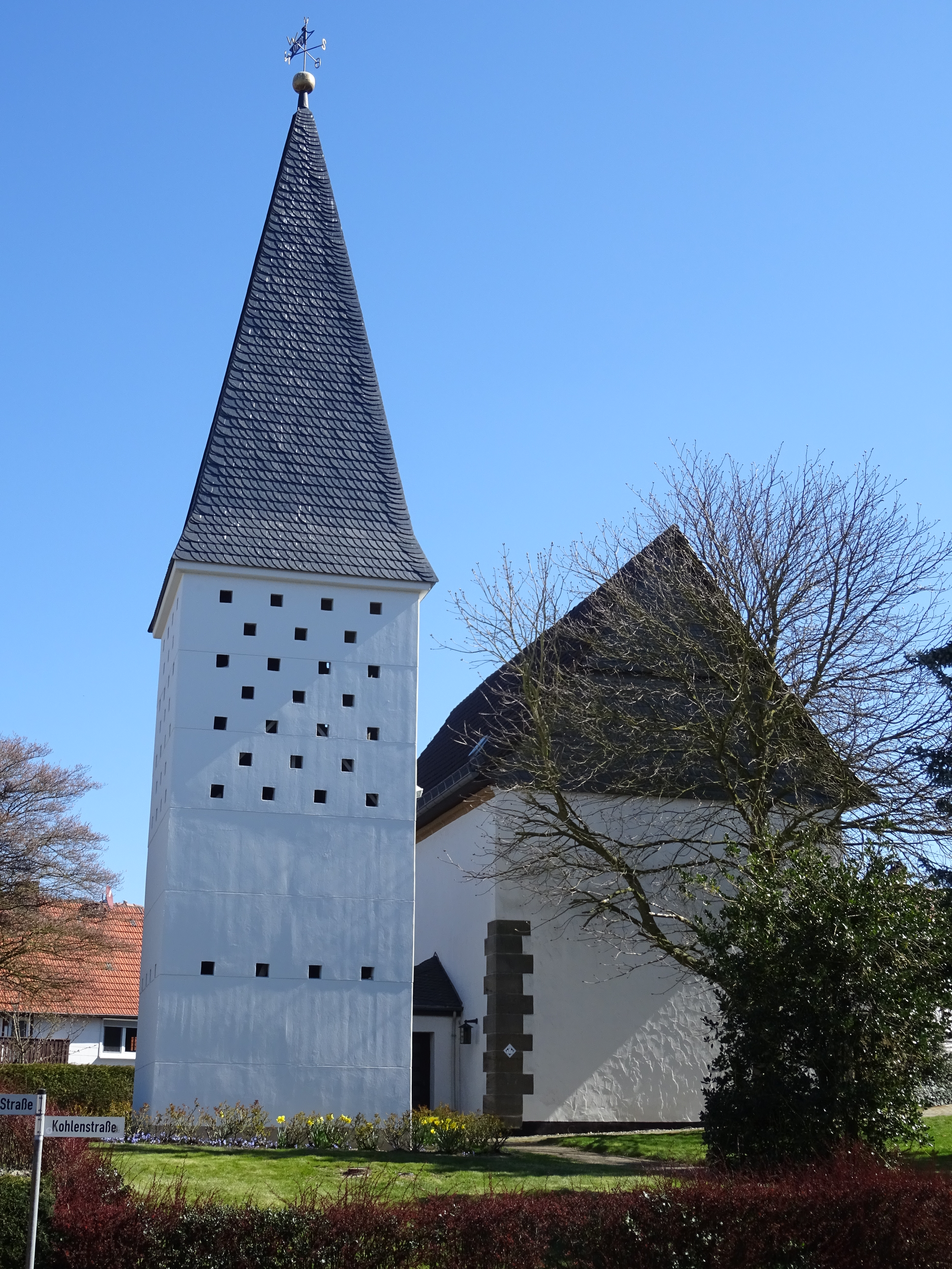 Turmseite